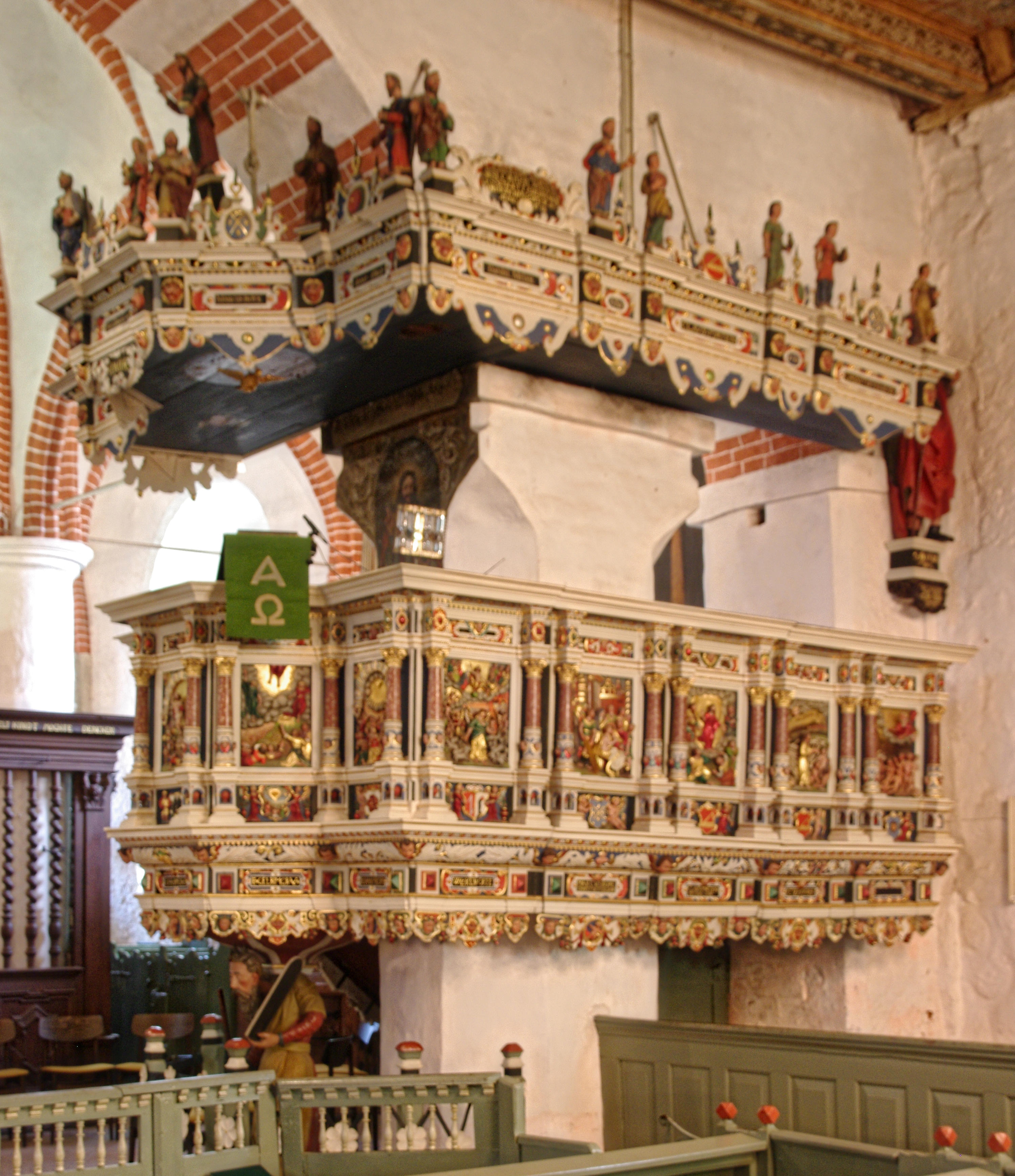 Die Kanzel in Richtung Chor